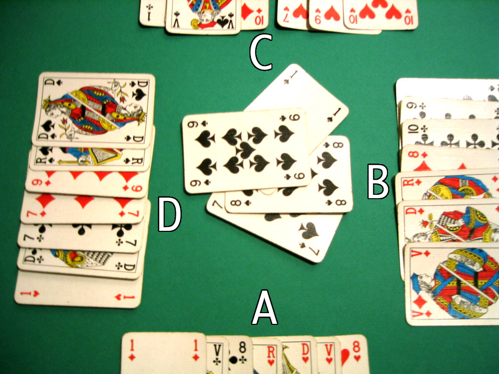 belote cartes